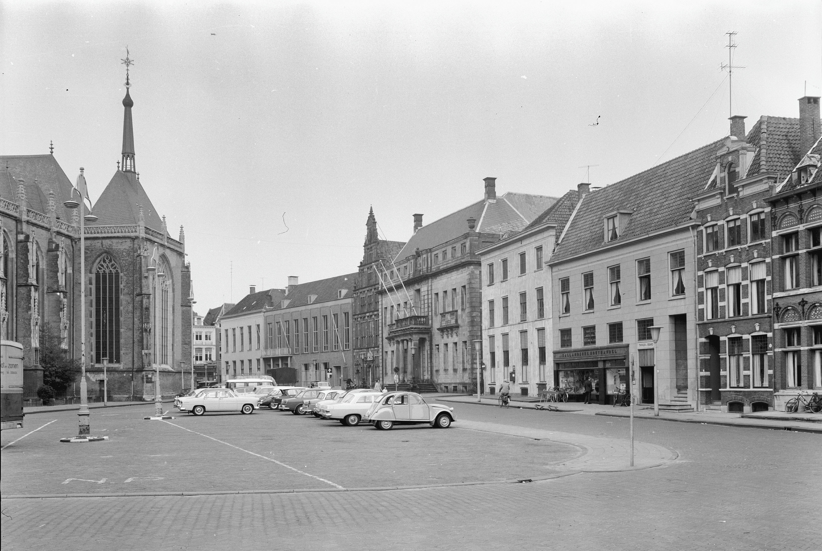 overzicht